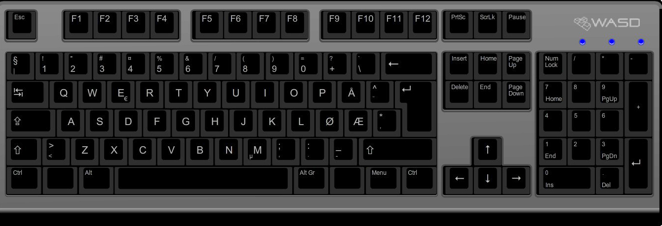 Et standard ISO-tastatur med 105 taster, og med norsk qwerty-oppsett